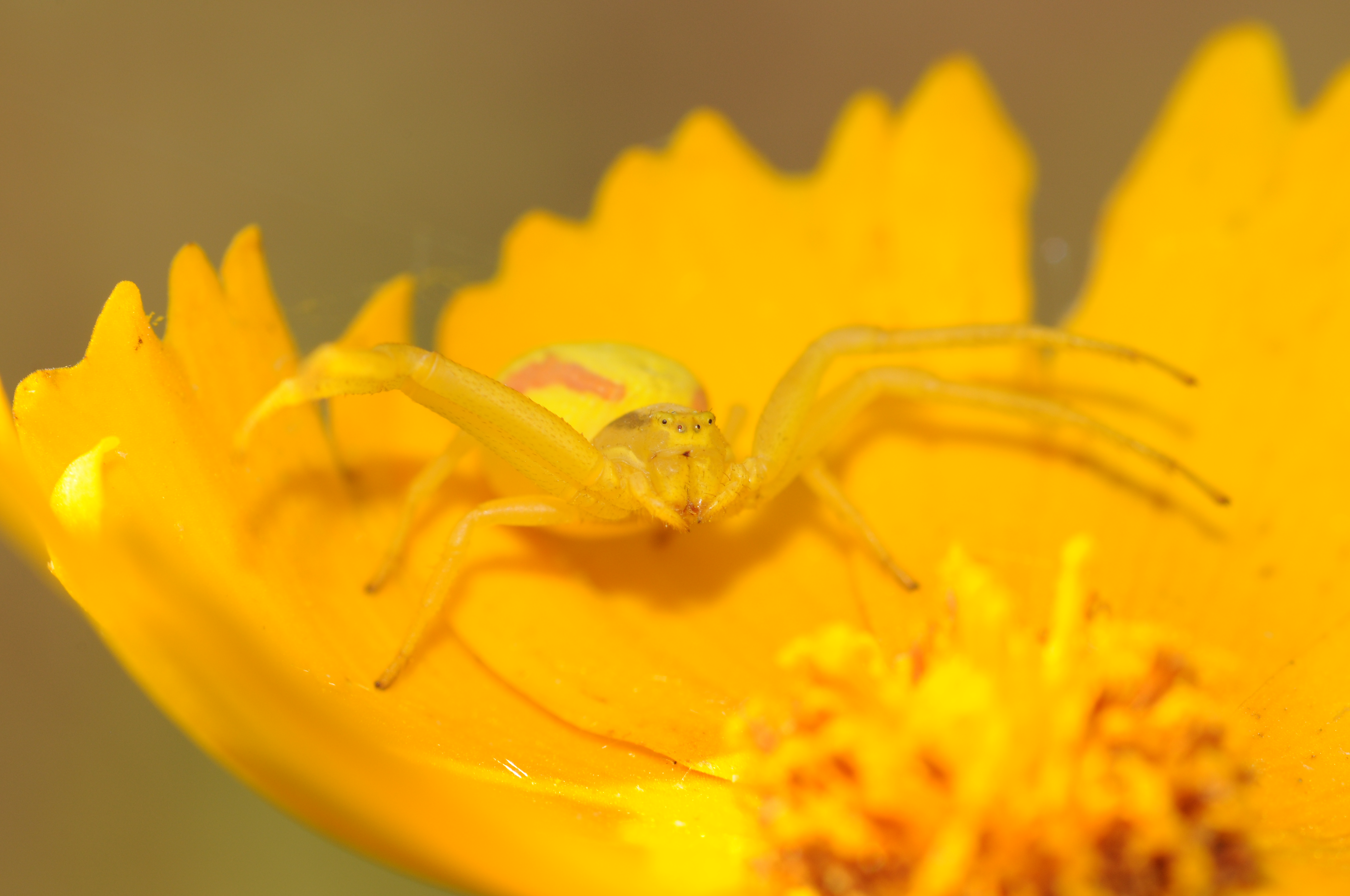 Araignée-crabe (thomise) sur une fleur. Crab-spider (thomisidae) on a flower.